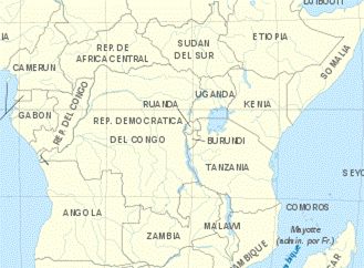 Divisiones políticas de África Central (fuente: se obtuvo por recorte de un mapa de África continental existente en el reservorio de imágenes de WikiCommons)